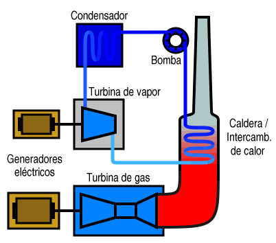 Esquema de un sistema COGAS turboeléctrico Same as Image:COGAS-diagram.png with Spanish legend. Modified version of a public domain drawing made by Alureiter. Modifications also released into public domain. Idéntica a Image:COGAS-diagram.png con leyendas en español. Versión modificada de un dibujo hecho por Alureiter y puesto por él en el dominio público. Las modificaciones son también colocadas en el dominio público.